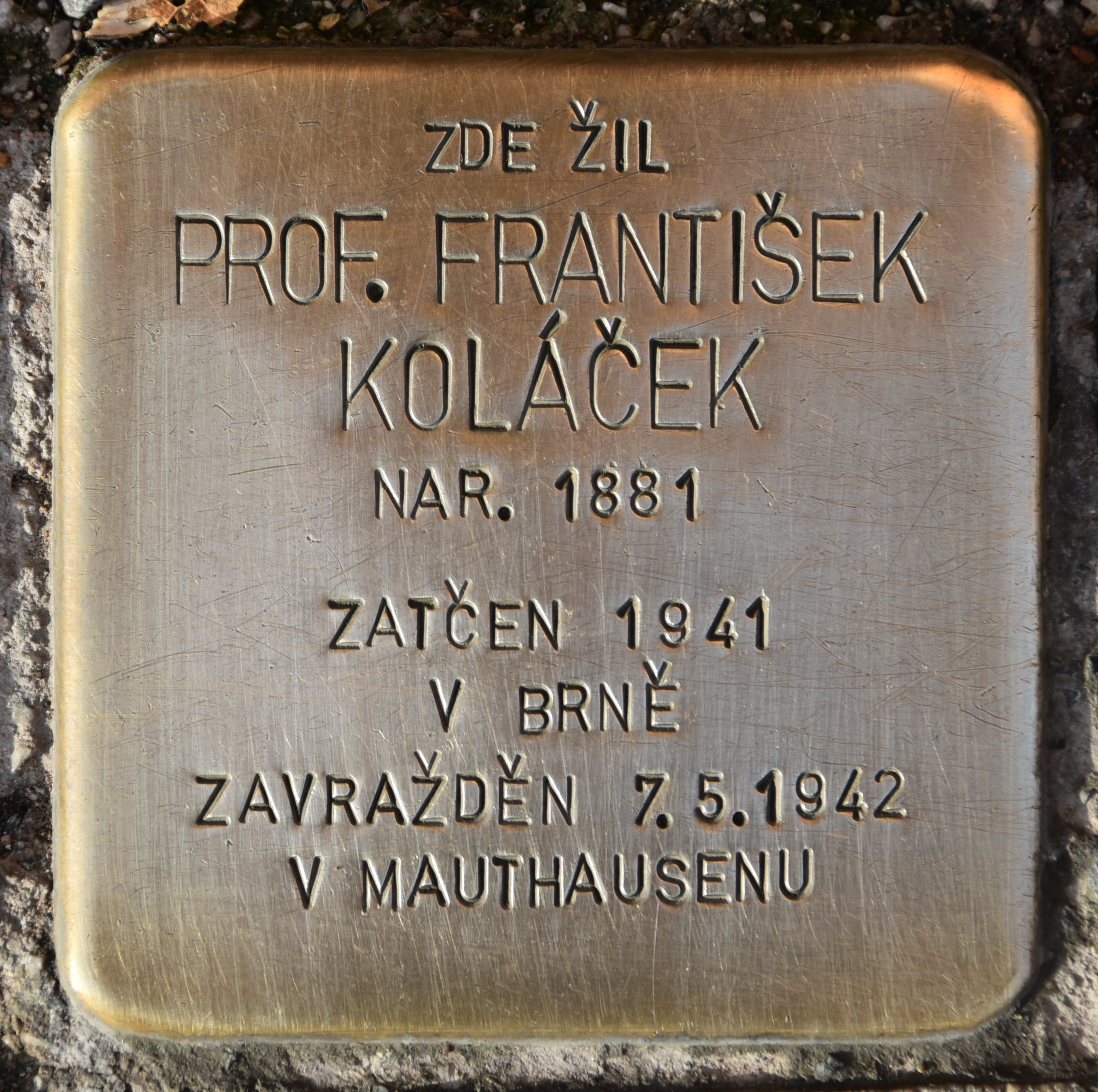 Stolperstein für Frantisek Kolacek